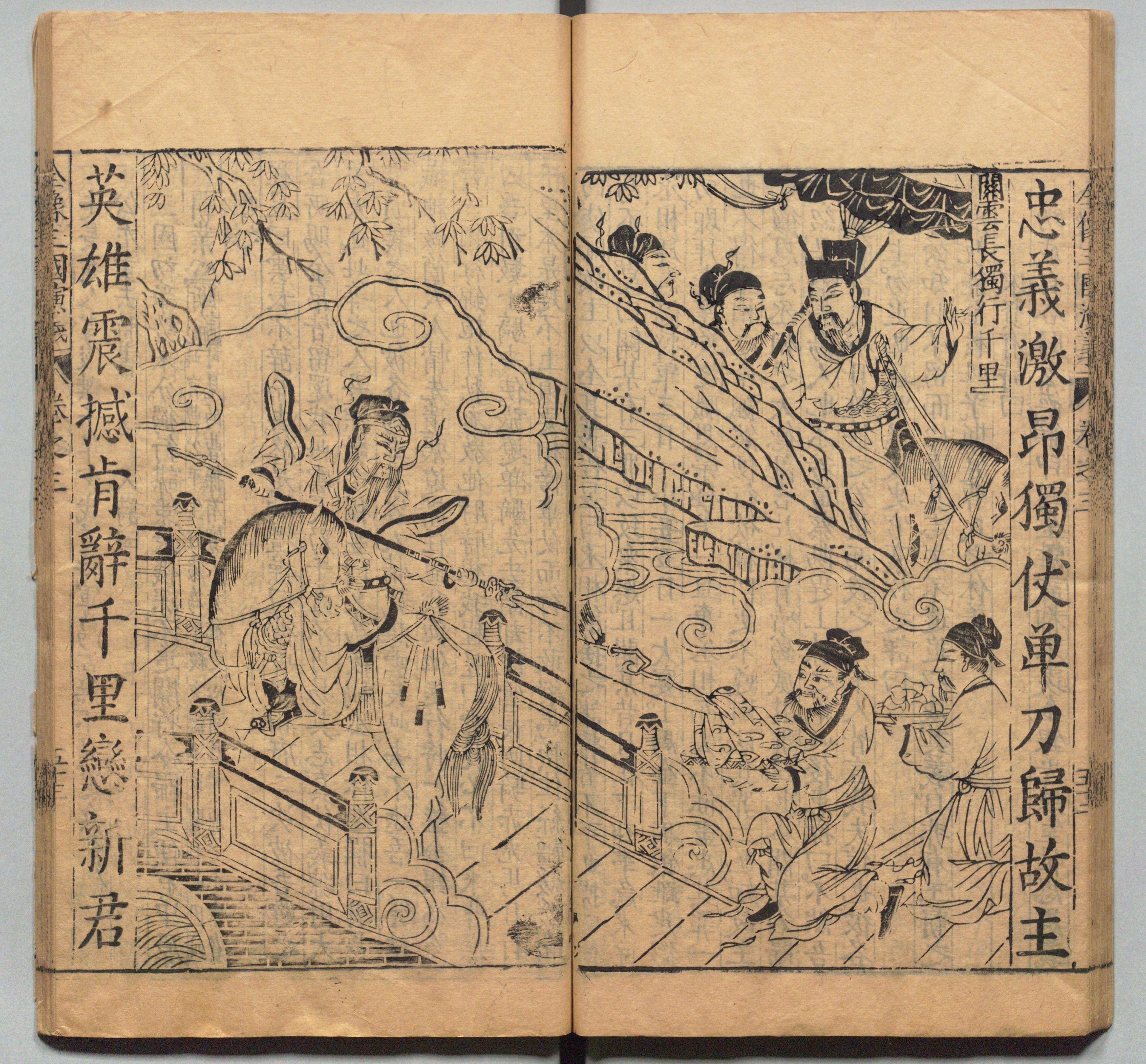 新刊校正古本大字音释三国志通俗演义 明万历十九年书林周曰校刊本